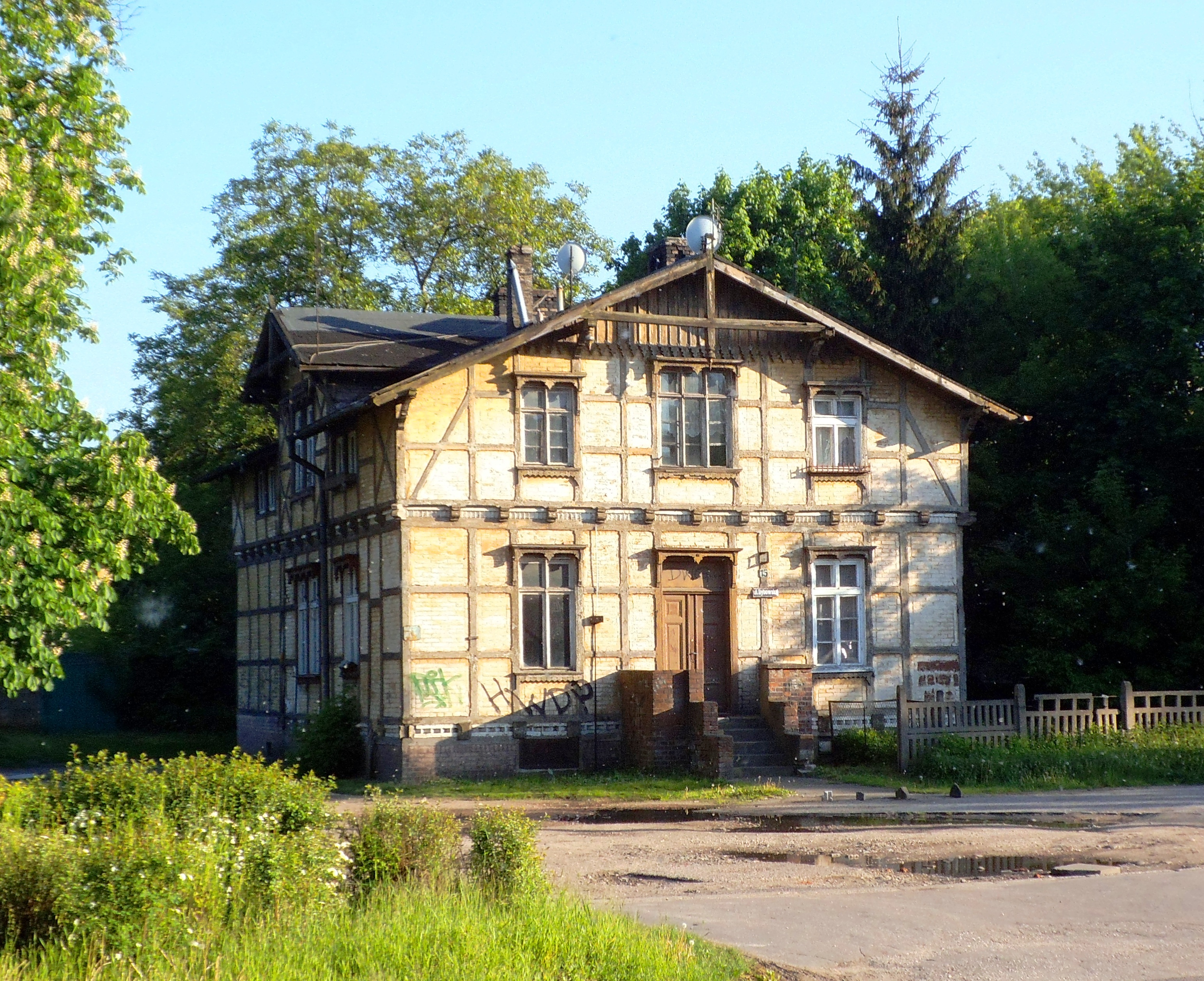 Dawny budynek dworcowy Toruń Główny